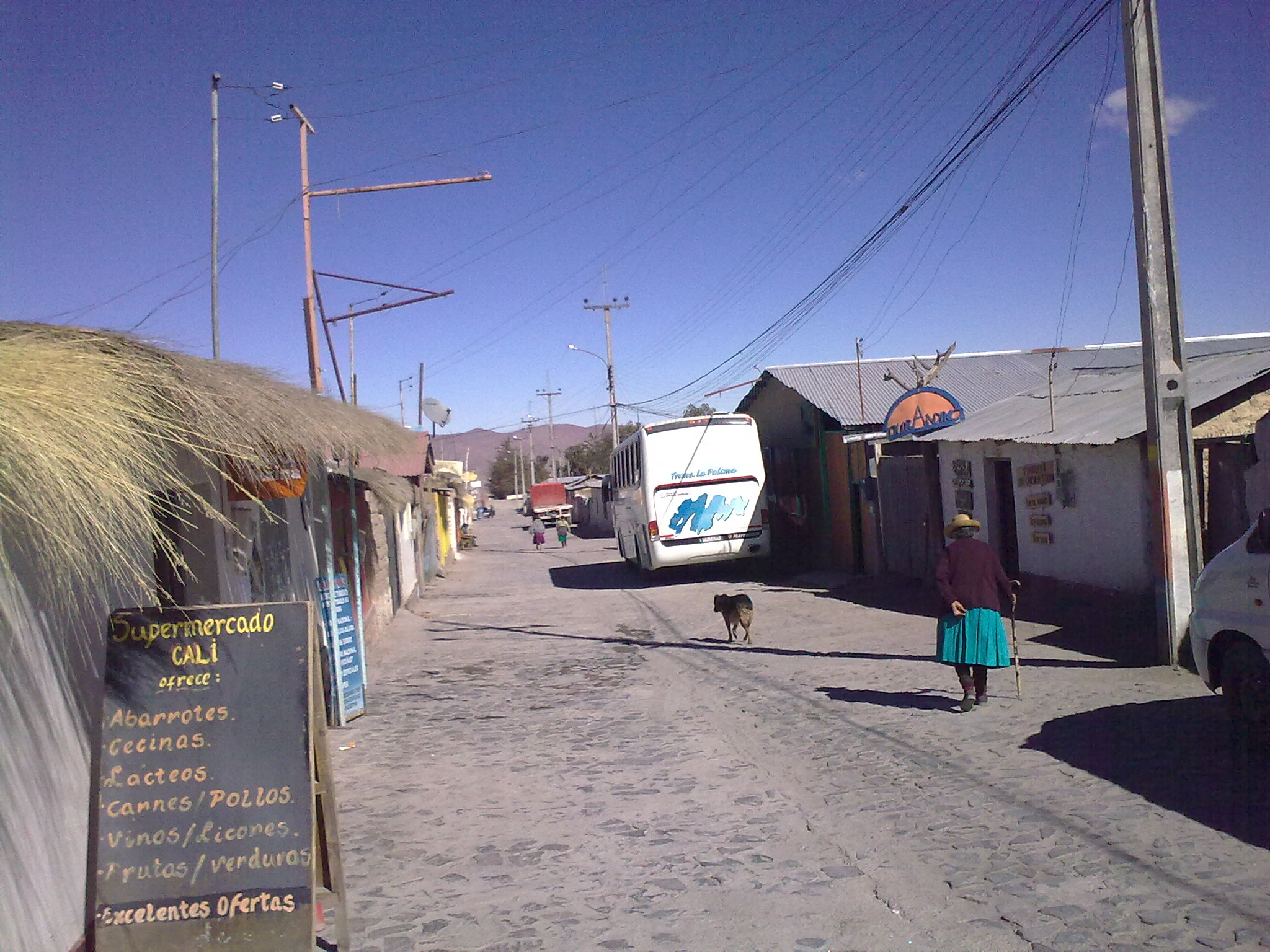 Putre - calle principal